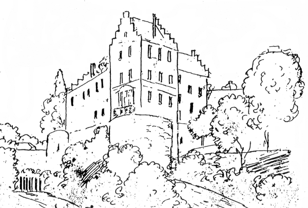 Zeichnung des Bischofsschlosses von 1927